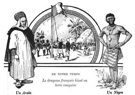 Illustration tirée de Histoire de France, cours élémentaire, Ernest Lavisse, Armand Colin, 1913, page 179 de l'édition Heath de 1919.